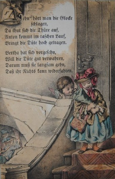 Eine Seite aus: Moritz Heger: Neues Zuckerdütenbuch für alle Knaben und Mädchen die zum ersten Male in die Schule gehen. Dresden, Meinhold & Söhne, (1859). Mit 16 getönten und kolorierten lithographischen Tafeln (einschließlich Titelblatt)